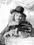 Jacob van Campen (1595–1657)